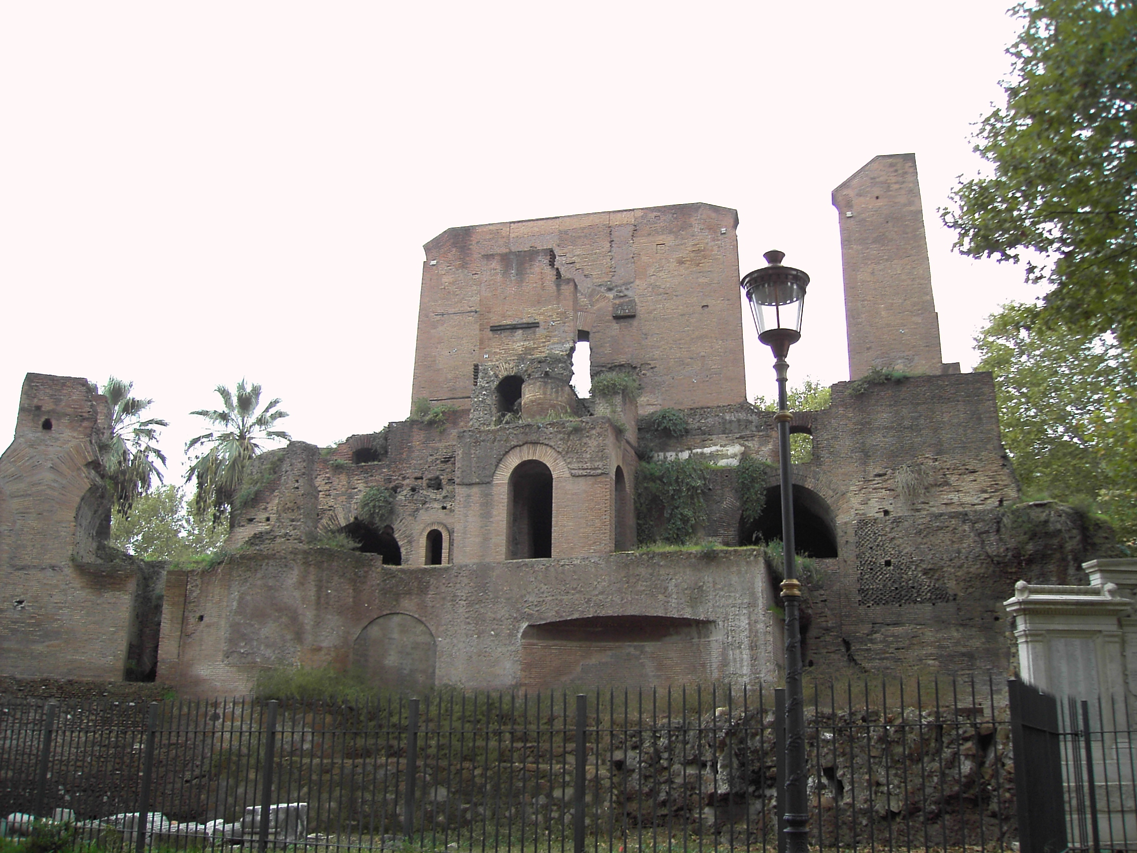 Roma, piazza Vittorio: resti della fontana momumentale detta "Trofei di Mario" o ninfeo di Mario, dai due busti marmorei oggi in Campidoglio by Lalupa